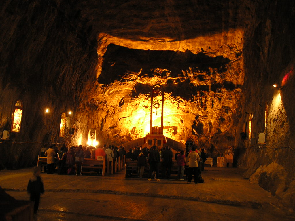 Capelă amenajată într-o veche cameră subterană de exploatare a sării geme la Salina Praid.